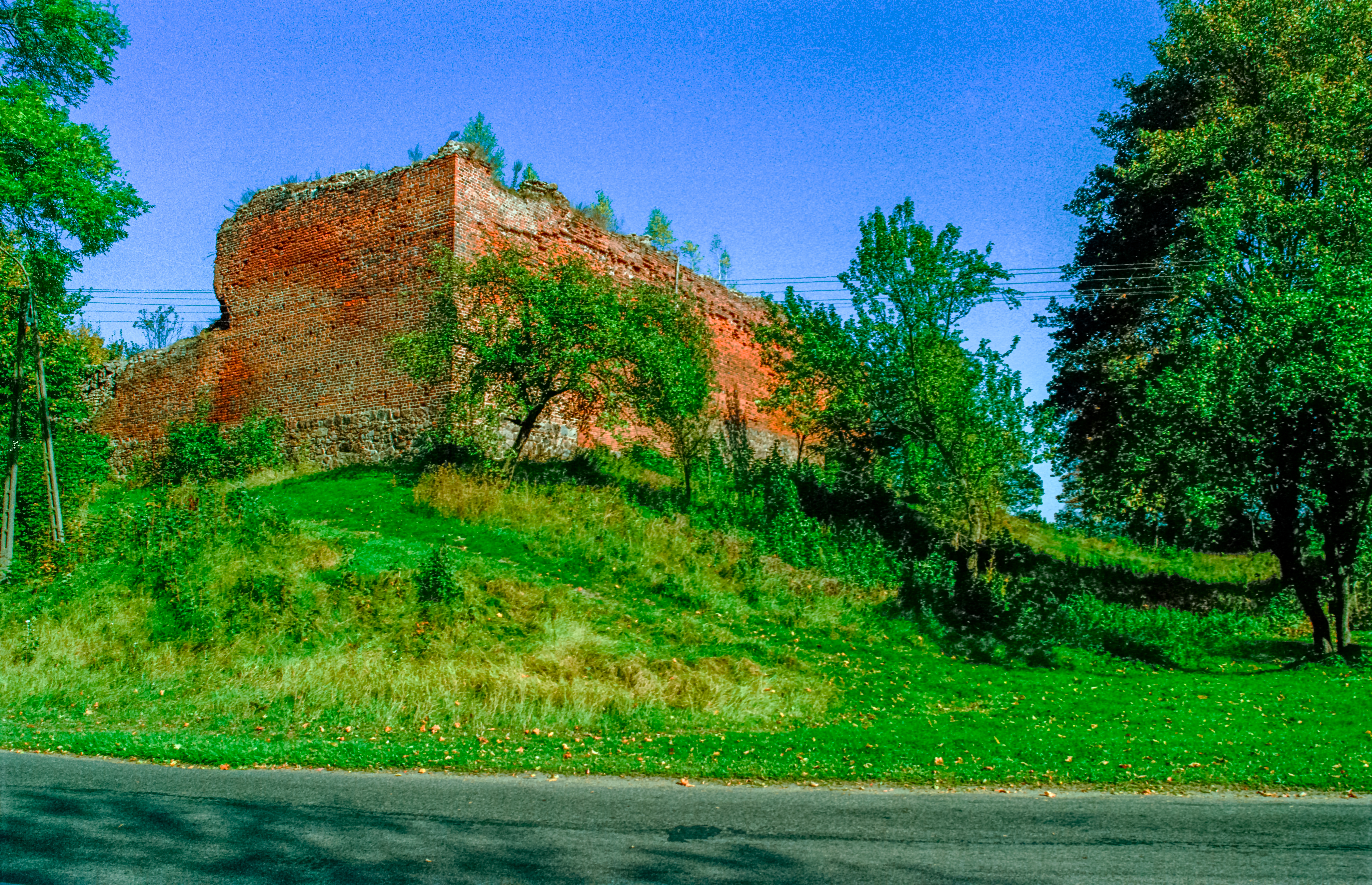 Drahim